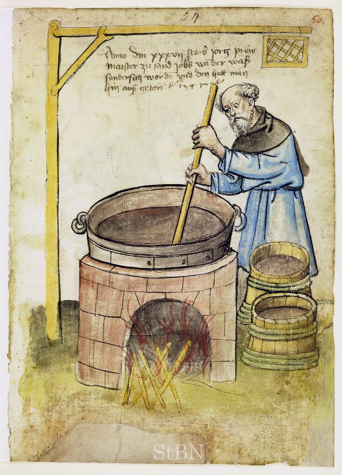 jorg (Jörg; Georg) prew maister (Braumeister; Breu) , prew maister (Braumeister) Transkription und weitere Informationen